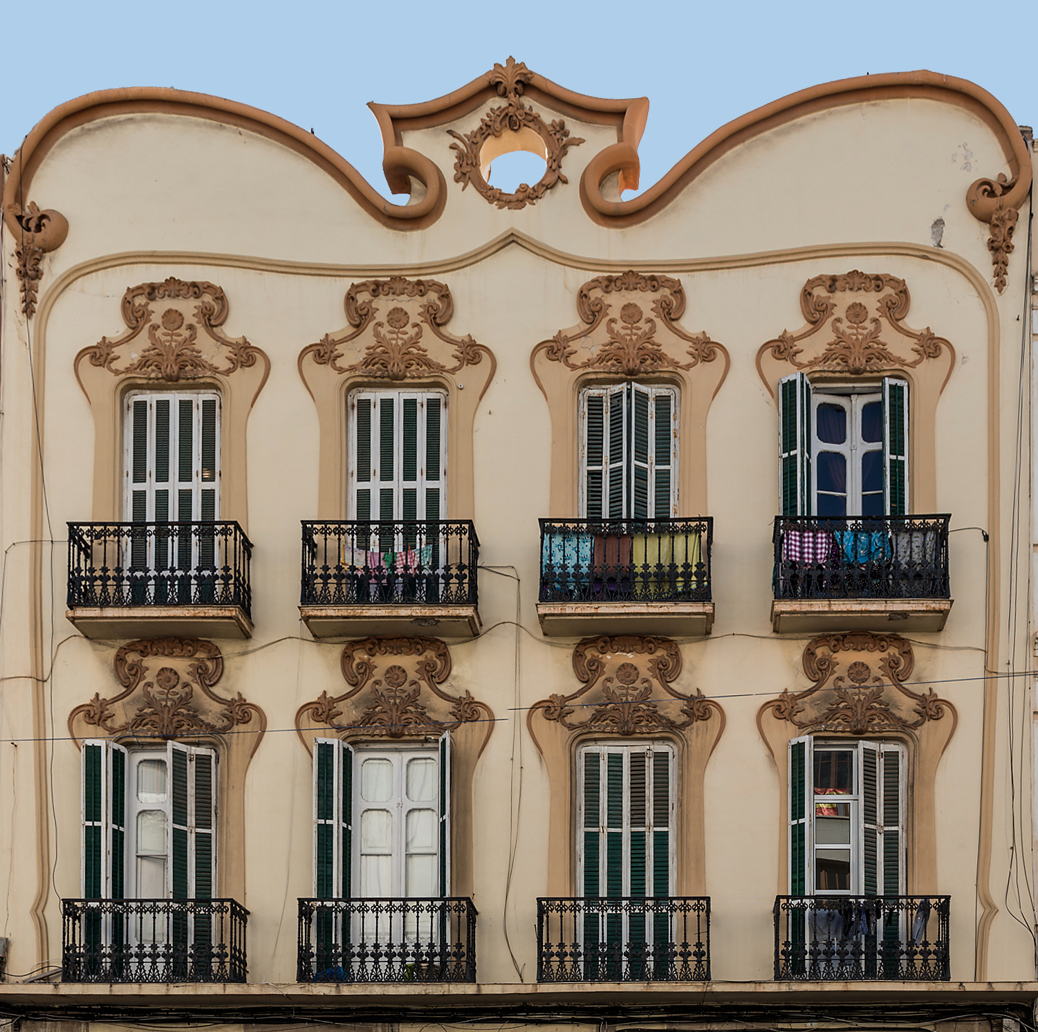 CASA DE ANTONIO BAENA GÓMEZ. EDIFICIO MODERNISTA. ENRIQUE NIETO Y NIETO 1910